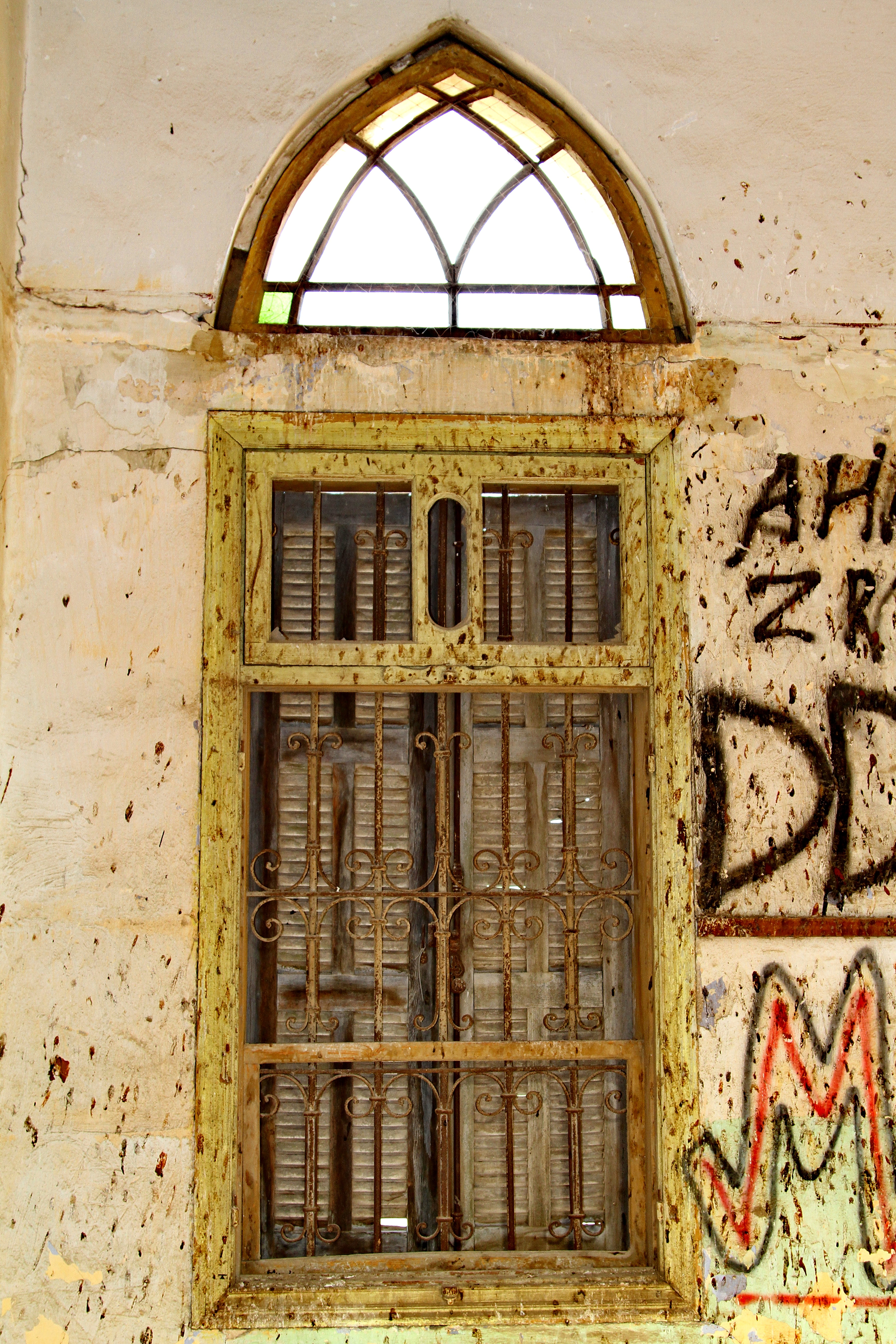 בית אמידים הוא בניין דו-קומתי ברחוב אלי כהן באשקלון, המהווה שריד לימי זוהרה של העיירה מג'דל (אשקלון כיום). התמונה מציגה פרט מתוך המבנה.